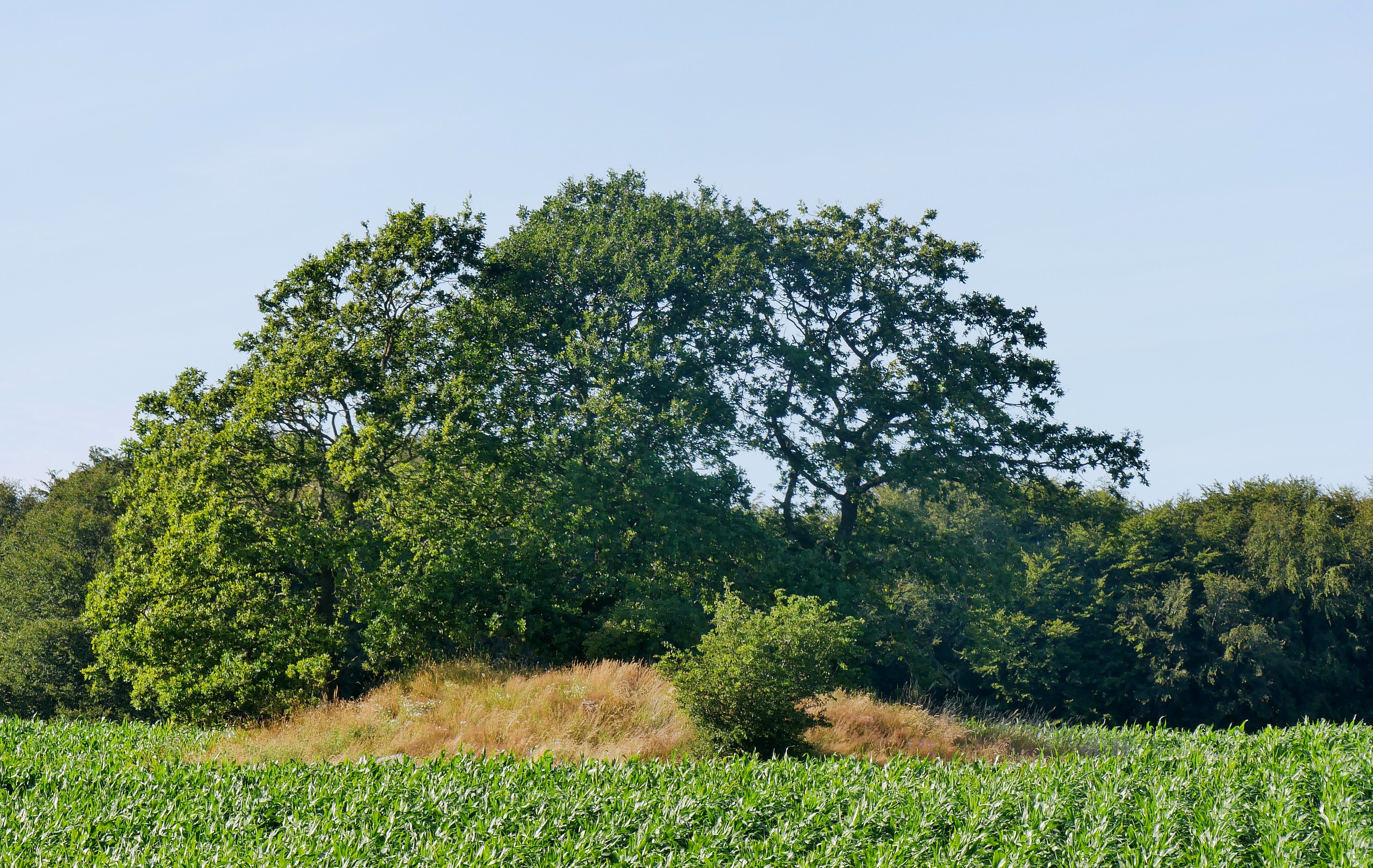 Ormhøj - Die eng benachbarten Ganggräber Jordhøj und Ormhøj (auch Ormehøj) liegen zwischen den Dörfern Voldstedlund und Katbjerg, ungefähr 100 m nördlich der Straße von Mariager nach Hobro, in der Nähe des Kongehøjen bei Voldstedlund in der dänischen Mariagerfjord Kommune in hohen Erdhügeln. Sie wurden vor etwa 5.200 Jahren in der Mitte der Jungsteinzeit von den Trägern der Trichterbecherkultur (TBK) errichtet. Das Ganggrab ist eine Bauform jungsteinzeitlicher Megalithanlagen, die aus einer Kammer und einem baulich abgesetzten, lateralen Gang besteht.